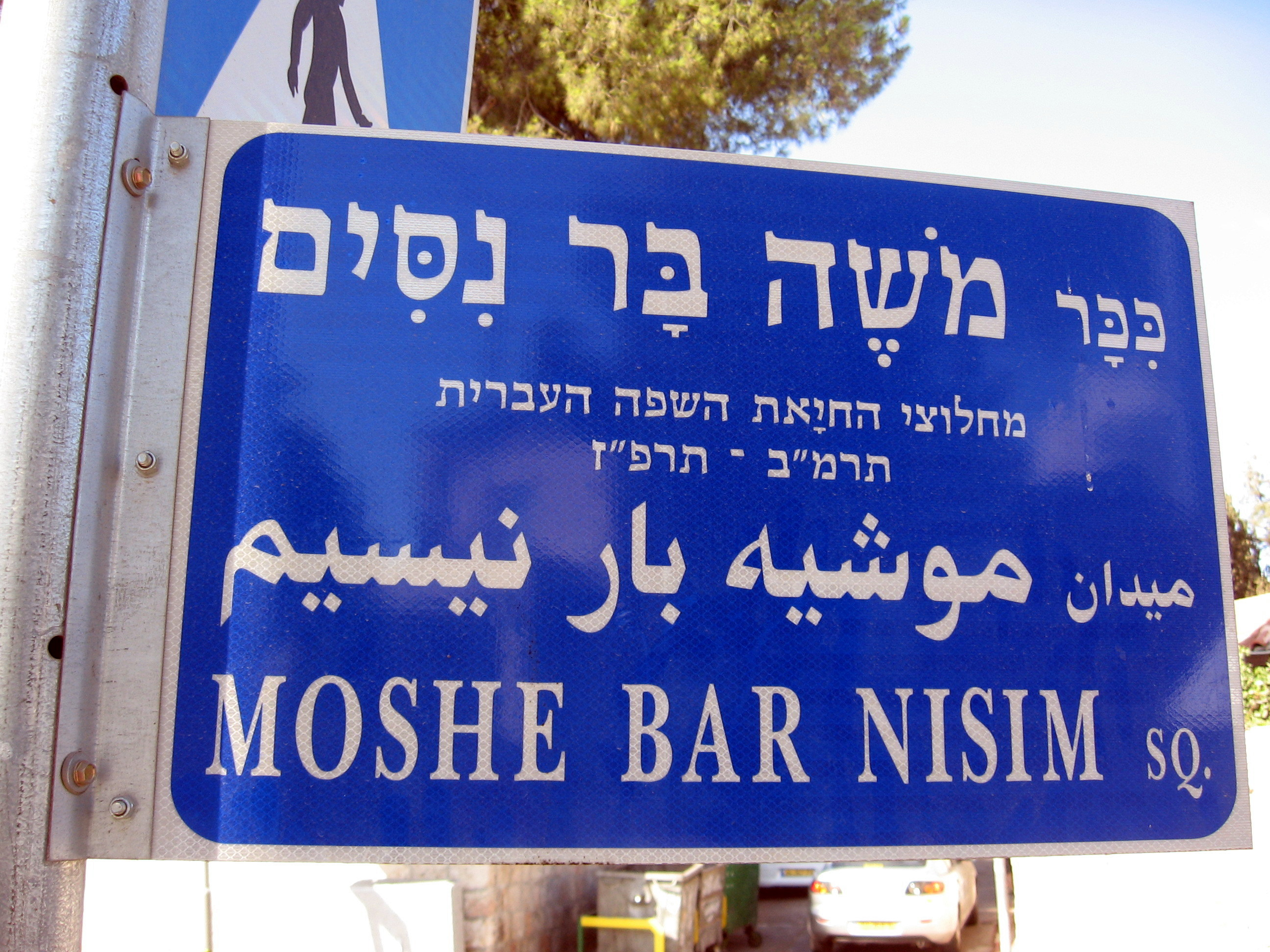 שלט כיכר משה בר נסים בירושלים. צילום: ערן עזריאלי